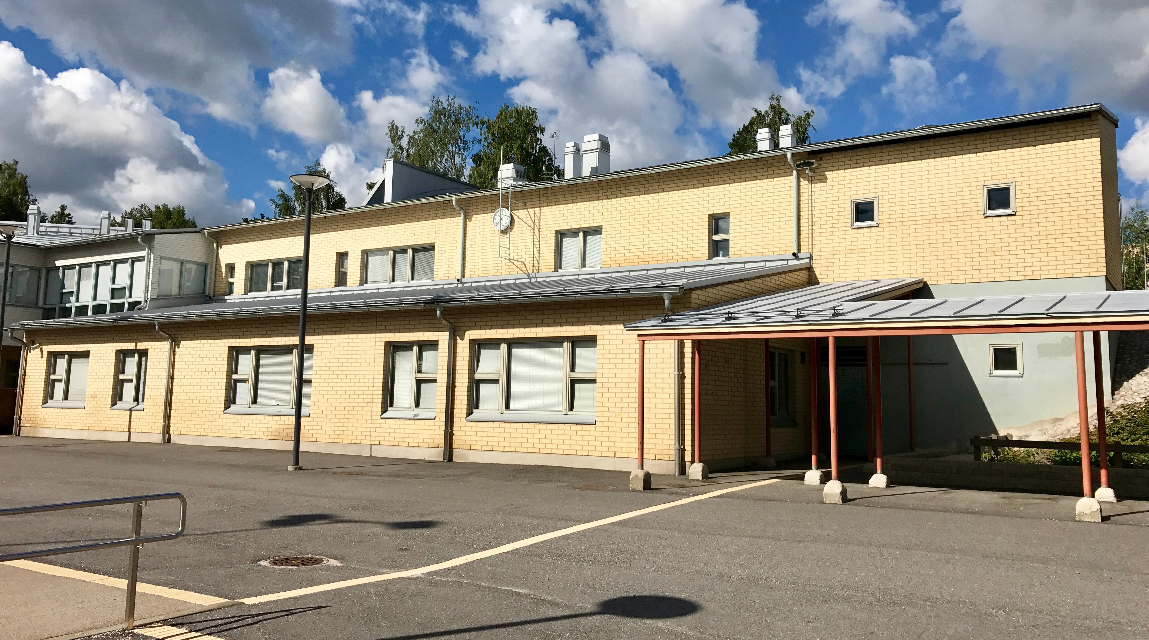 Postipuun koulu Espoon Leppävaarassa.